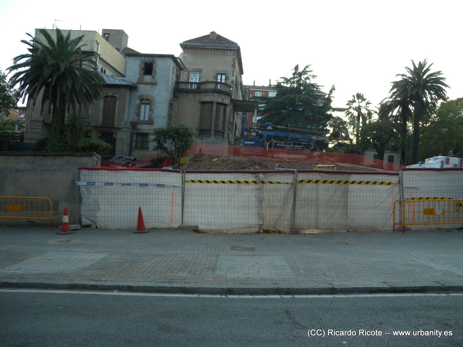 Sant Gervasi - la Bonanova, Barcelona, Spain